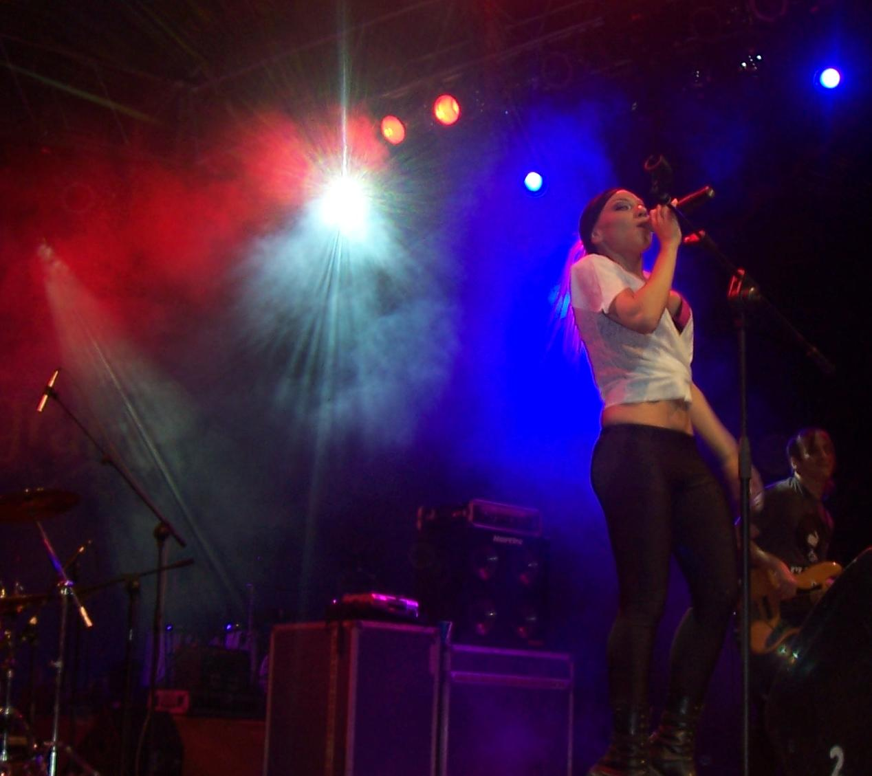 Lourdes, ex integrante del grupo banda, brindando un recital en la Fiesta Nacional del Inmigante, Oberá, Misiones.